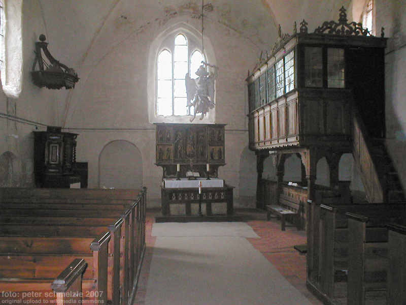 Dorfkirche Nätebow in Bollewick, Lkr. Müritz